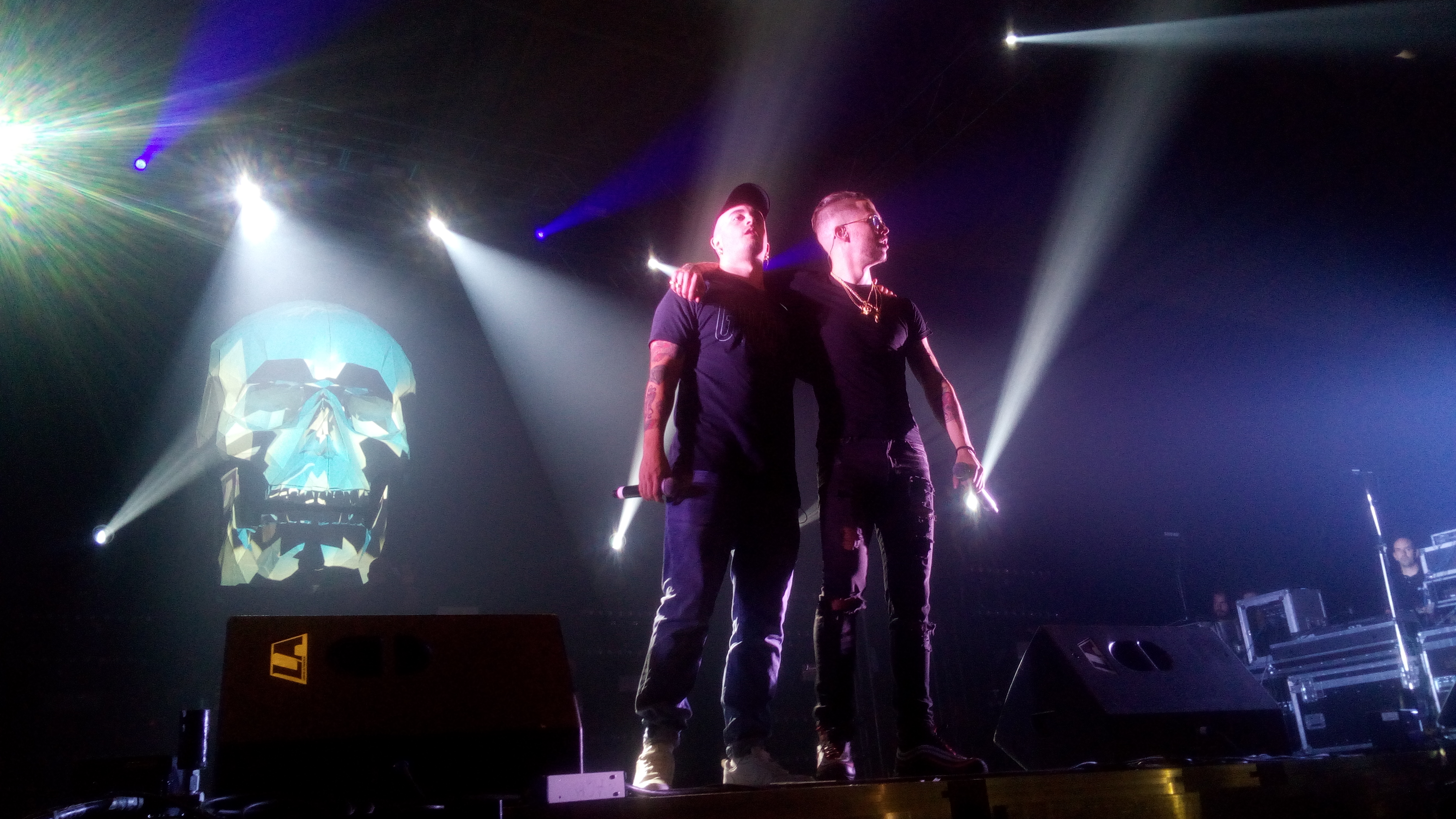 Natos y Waor en concierto